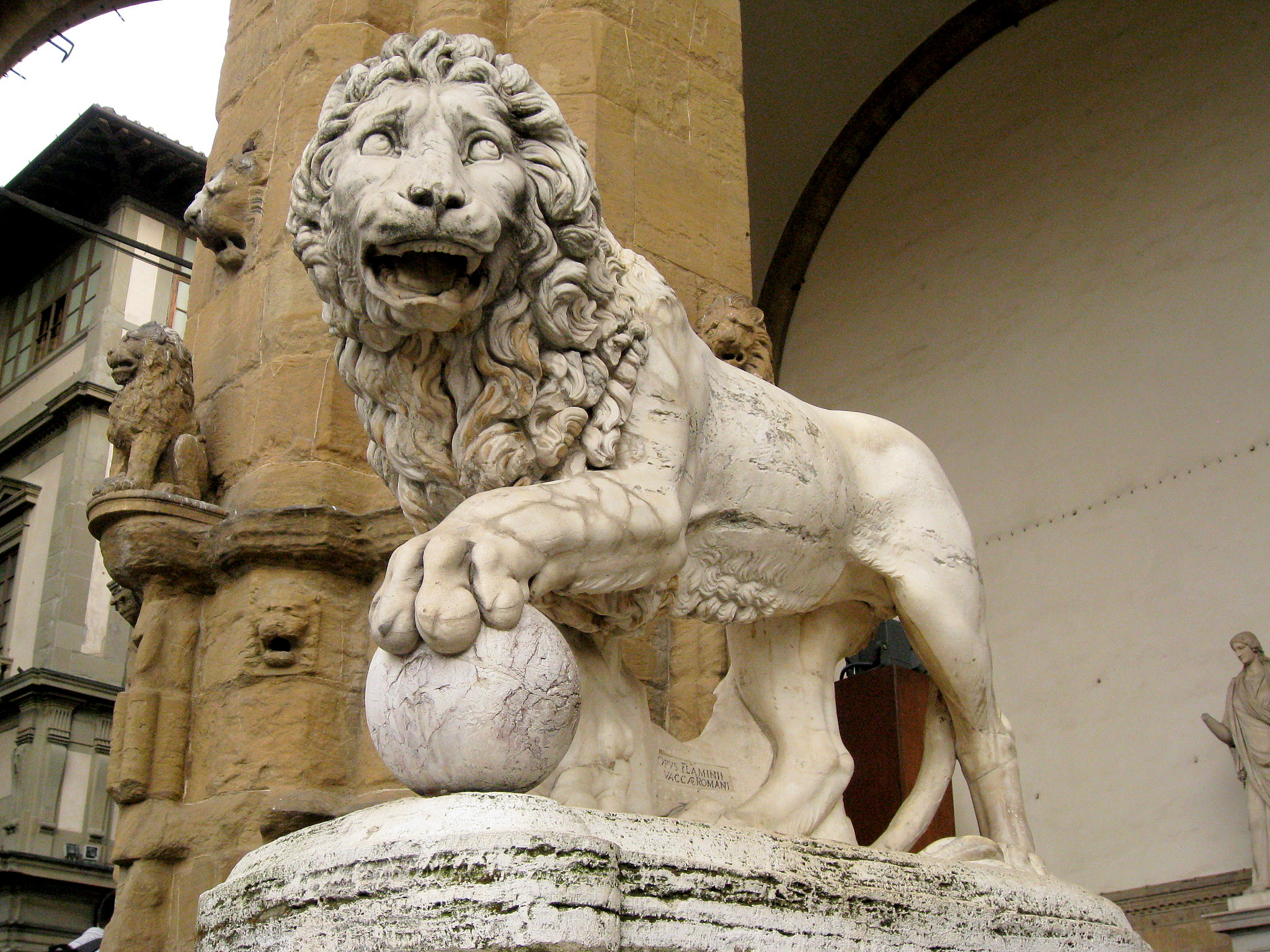 Florence Loggia dei Lanzi Left lion by Flamino Vacca